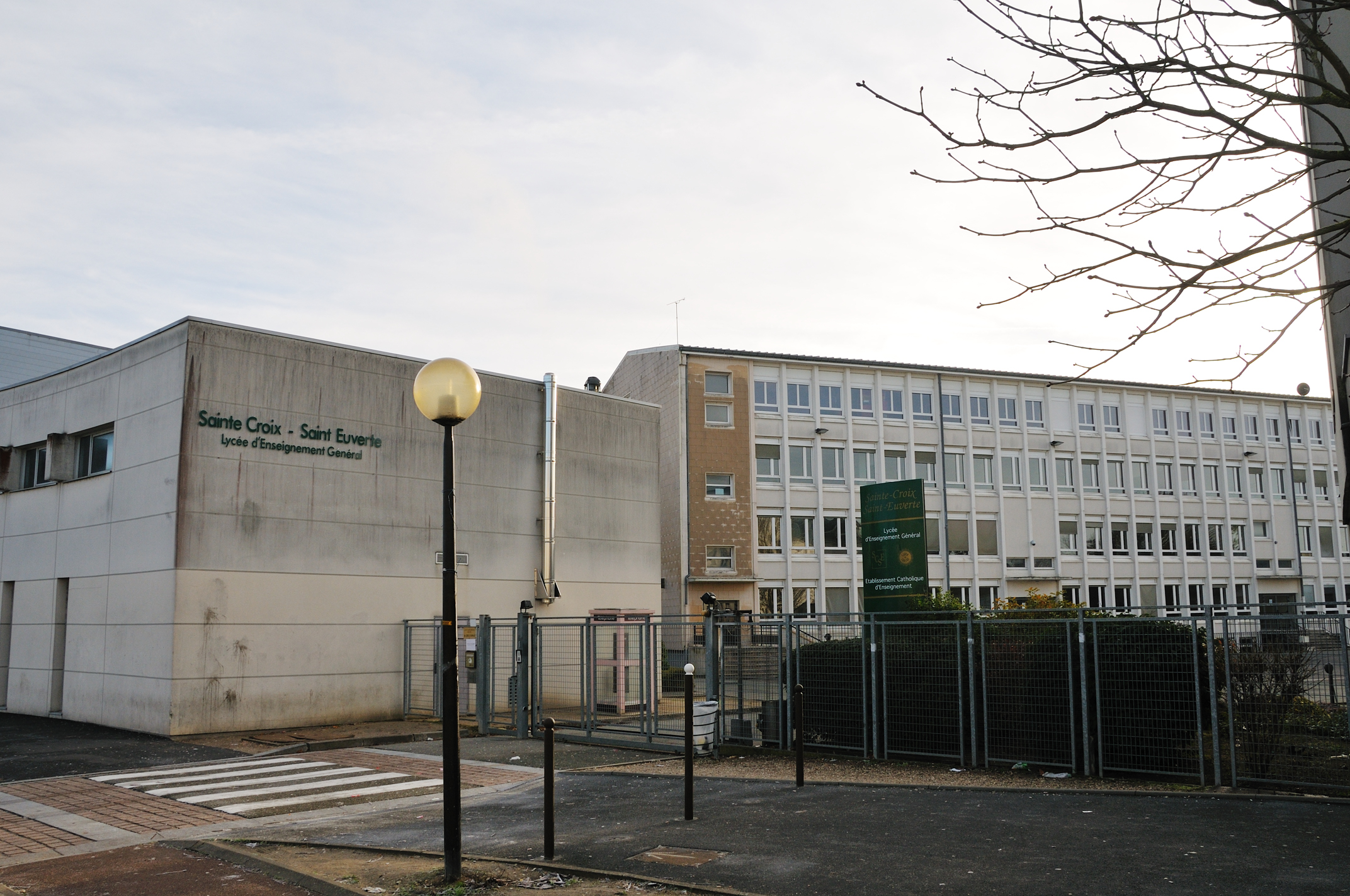 Lycée privé Sainte-Croix-Saint-Euverte, place du Champ Saint Marc, Orléans, Loiret, France